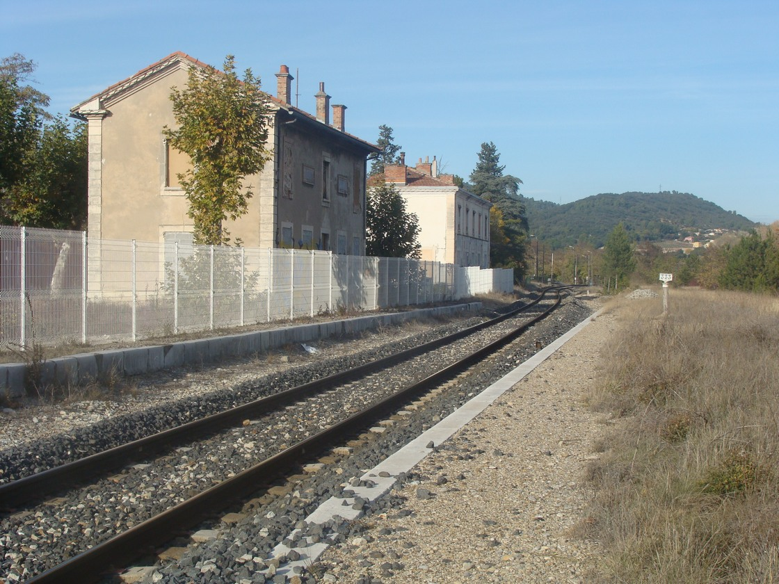 La voie ferrée Manosque - Sisteron devant la gare de Volx (fermée). La gare comportait un évitement, qui a été supprimé. La voie unique restante a été reprofilée pour permettre aux circulations de passer en pleine vitesse la courbe située au fond.